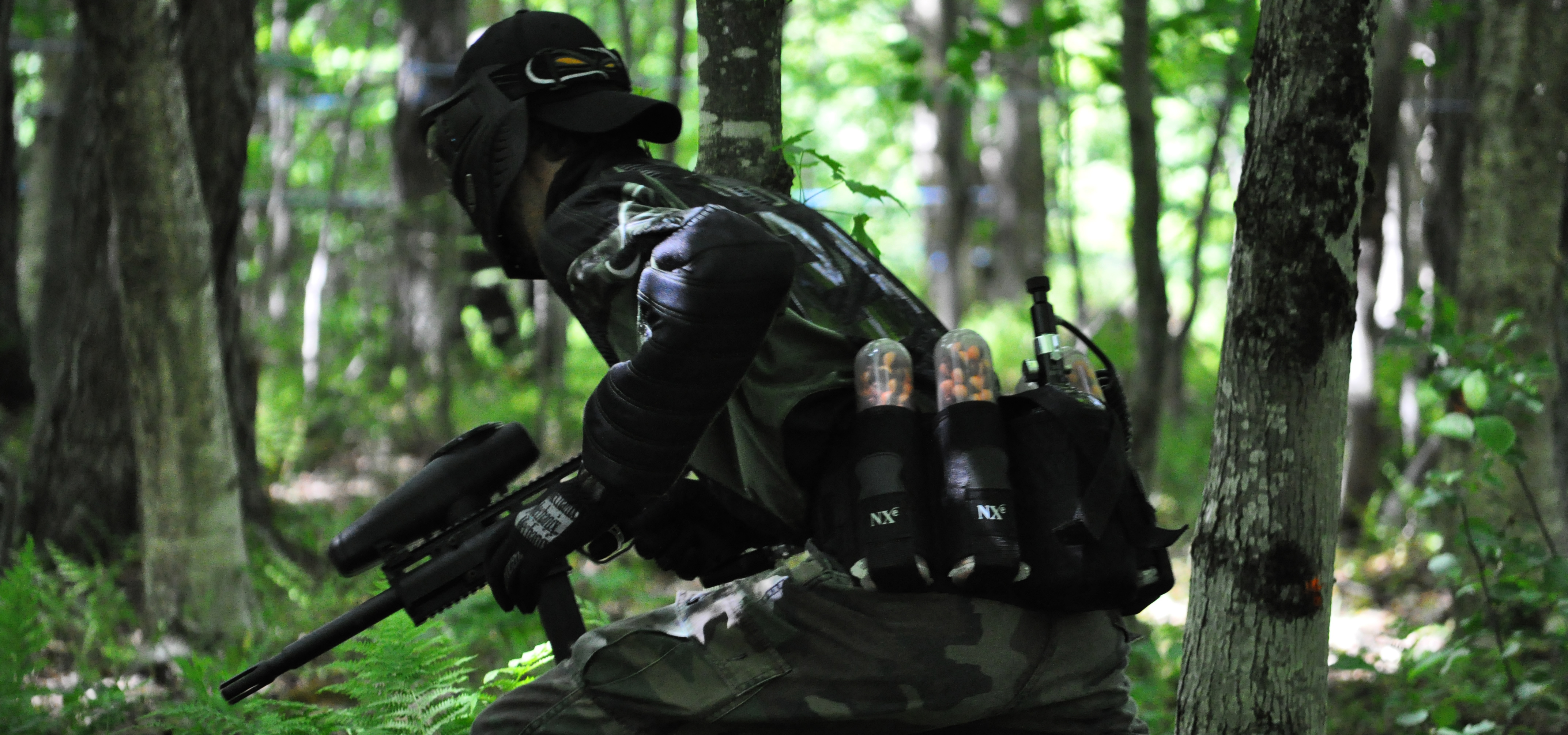 Joueur de paintball en action (NAdo)